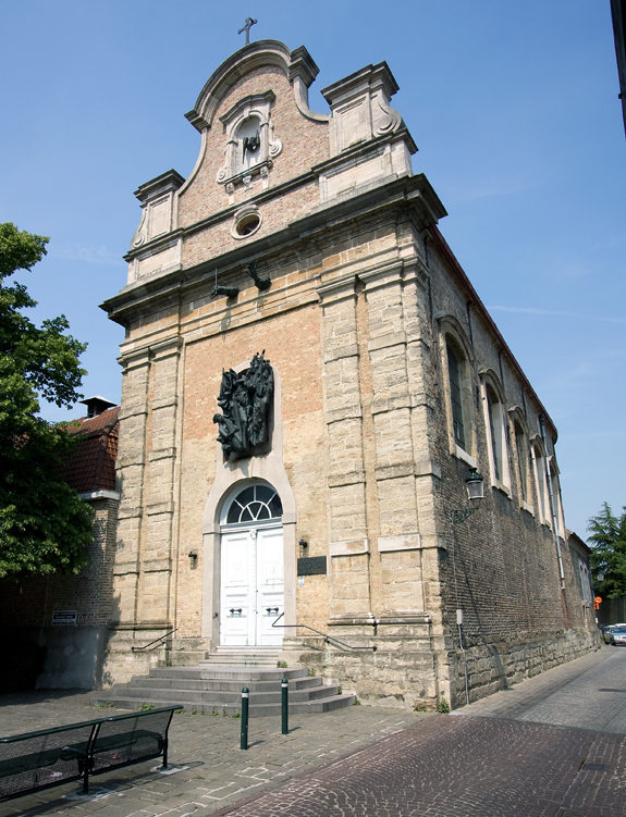 De voormalige Theresianenkerk, thans Joseph Ryelandtzaal, in Brugge